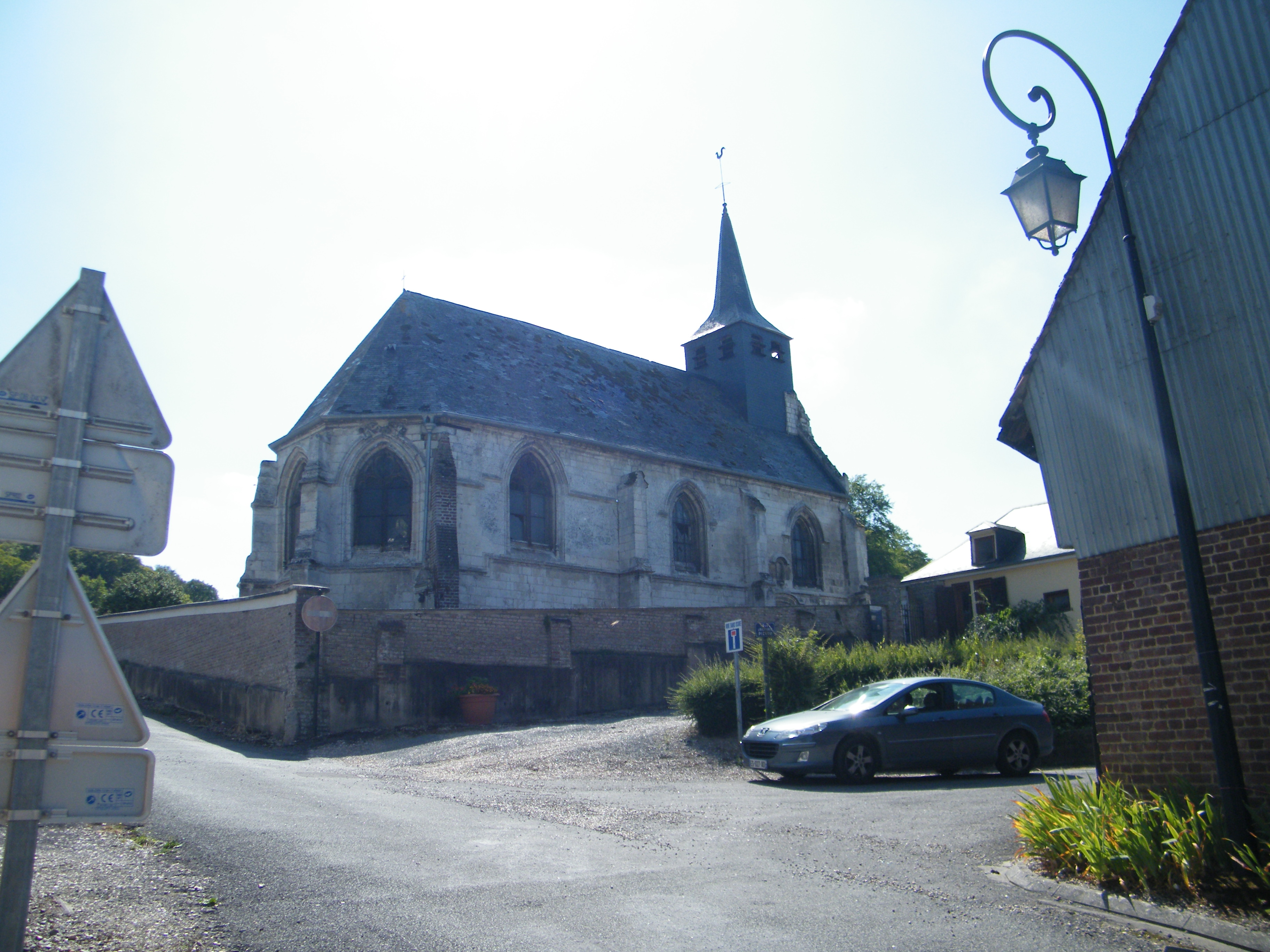 Fontaine (Somme), église Notre-Dame-de-l'Assomption de Vieulaines.